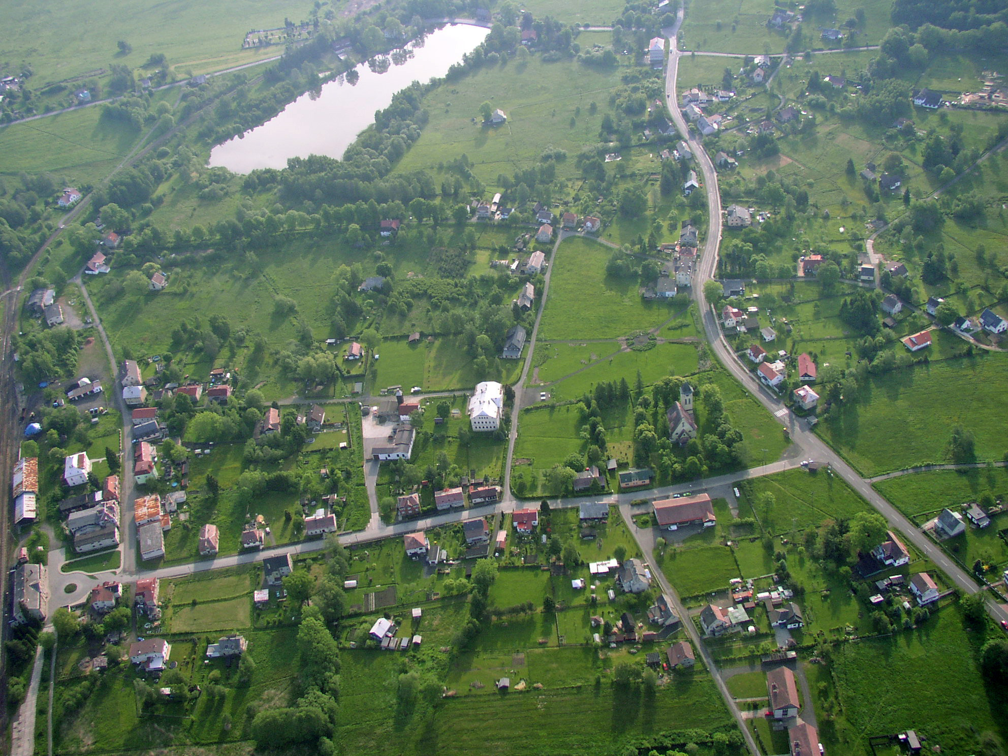 Luftbild von Dorf Rybniště, Czech republic